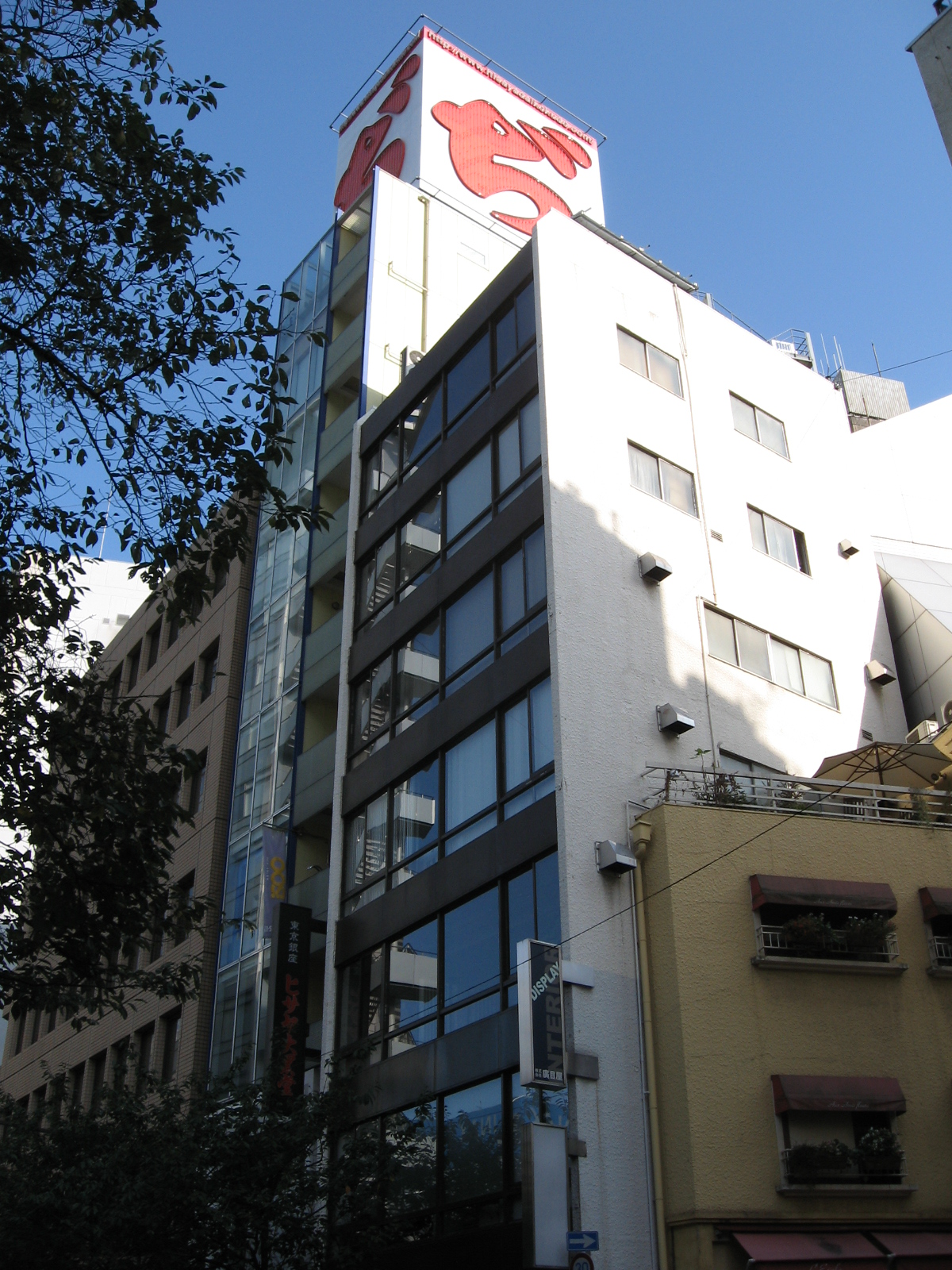 ヒサヤ大黒堂東京銀座薬寮（東京都中央区銀座）